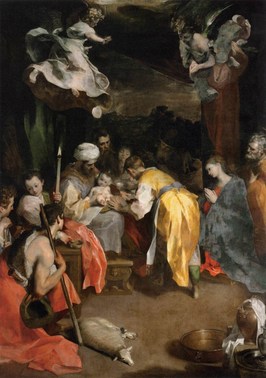 La circoncision